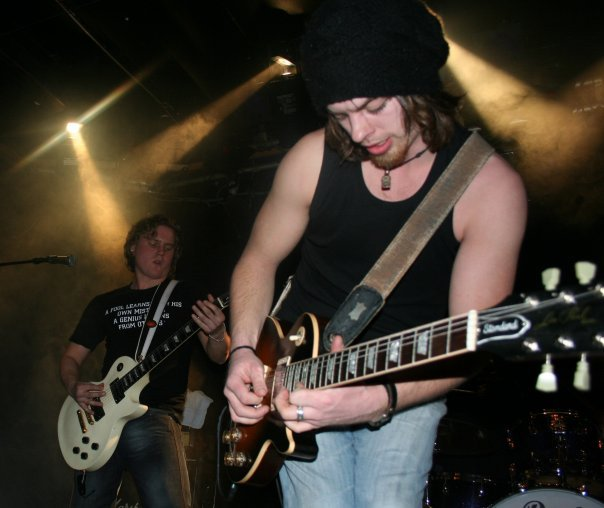 Shoot the Breeze på Smuget 14. Februar 2009